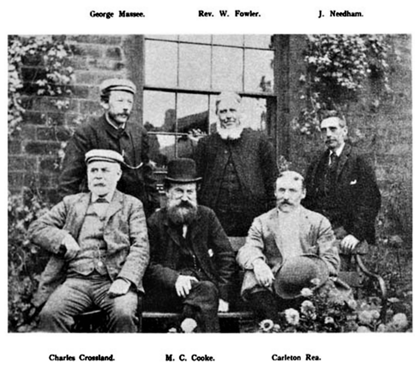 Mordecai Cubitt Cooke und andere Mykologen um 1900